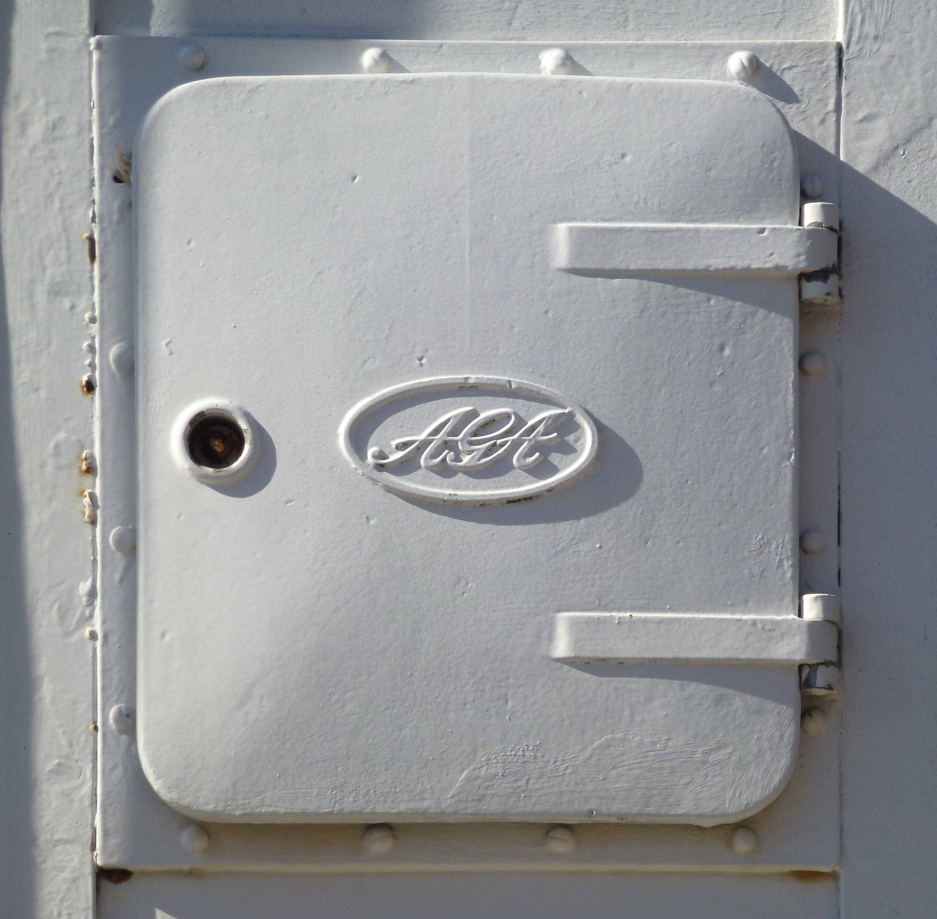 AGA Danvikskanalen